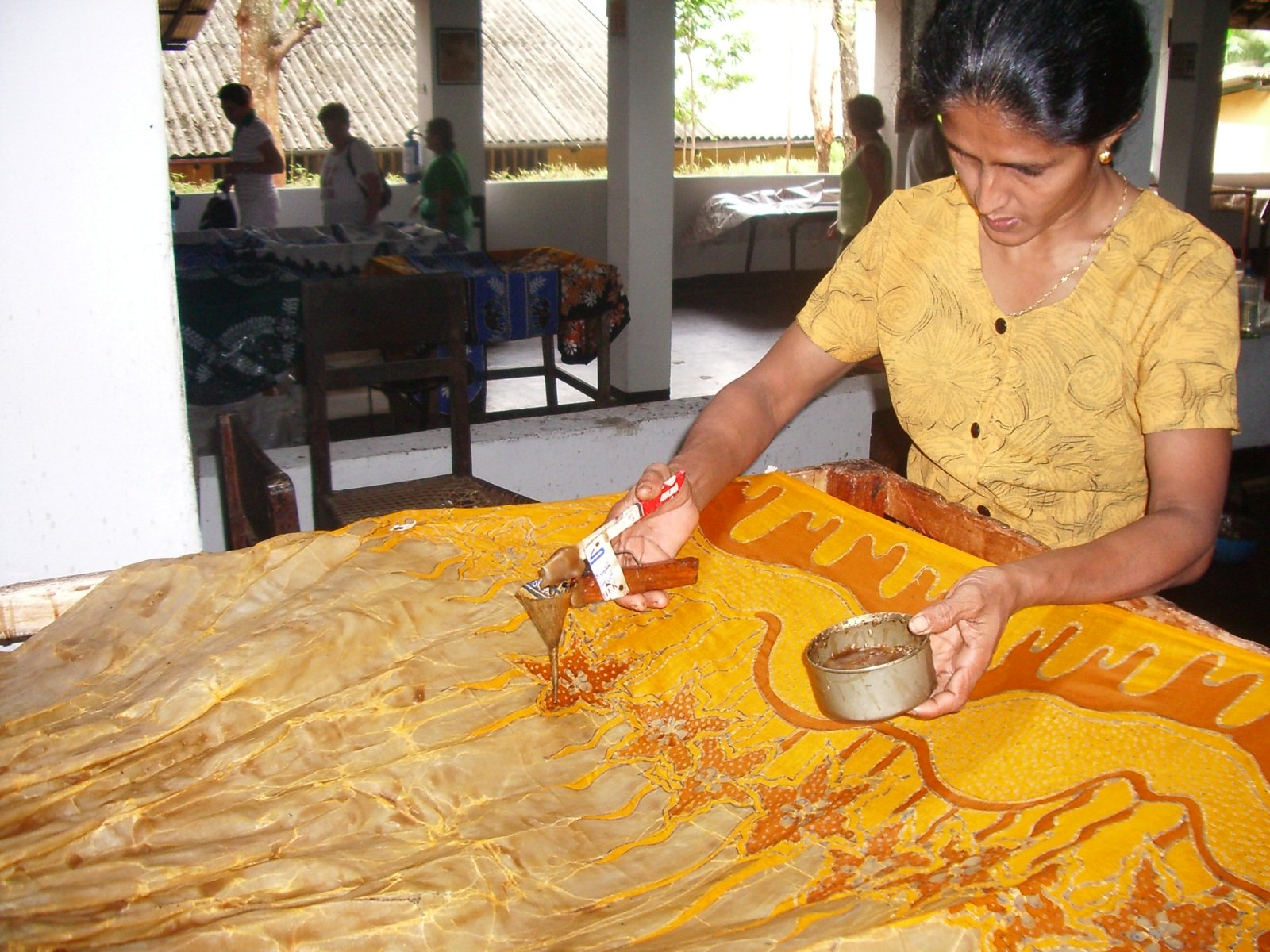 encerat previ a la coloració d'un batik, foto feta prop de Kandy per J. Ollé el juliol del 2006